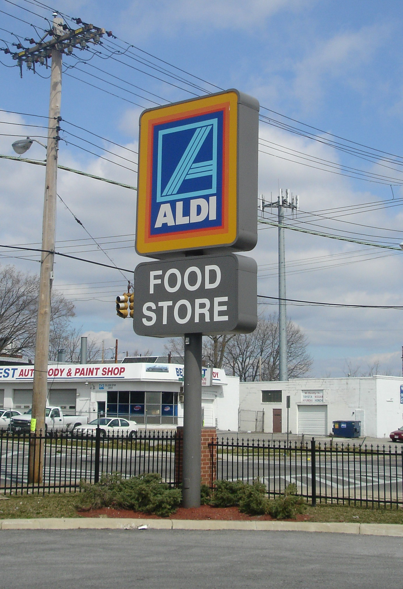 US Aldi Sign in Baltimore, MD